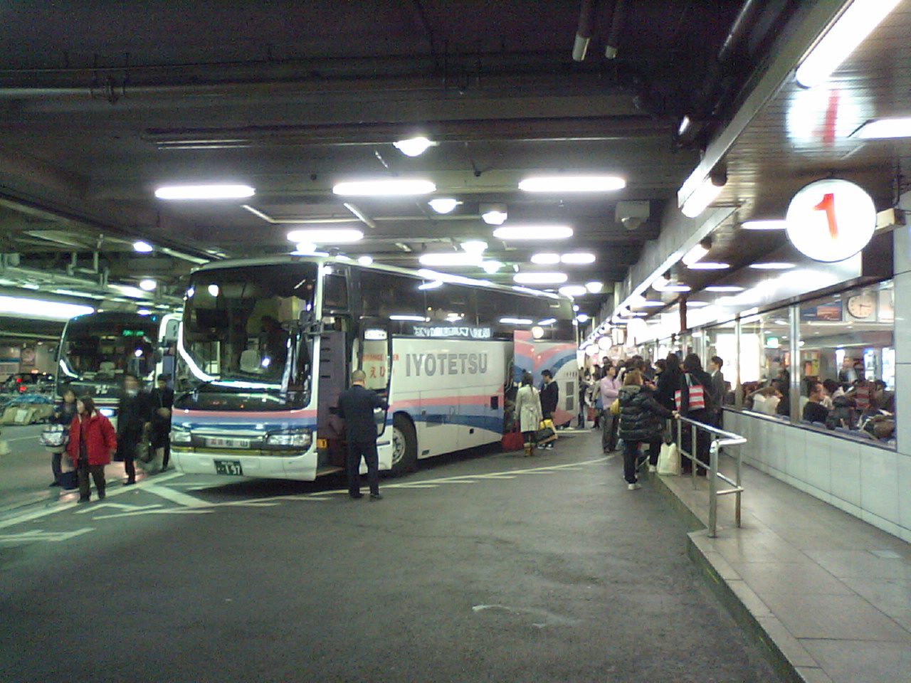 Hankyu Sanbangai Bus terminal (Umeda,Osaka,Japan)